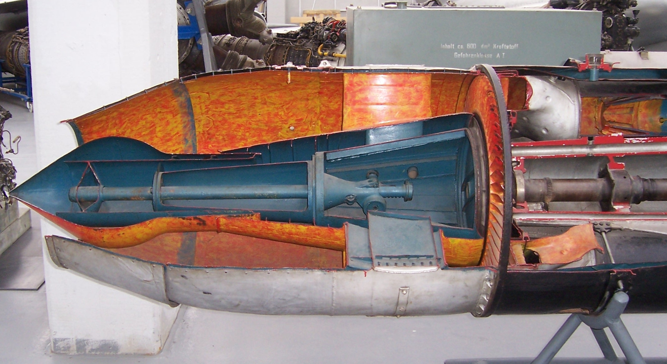 Jumo 004 im Technikmuseum Hugo Junkers Dessau 2010-08-06